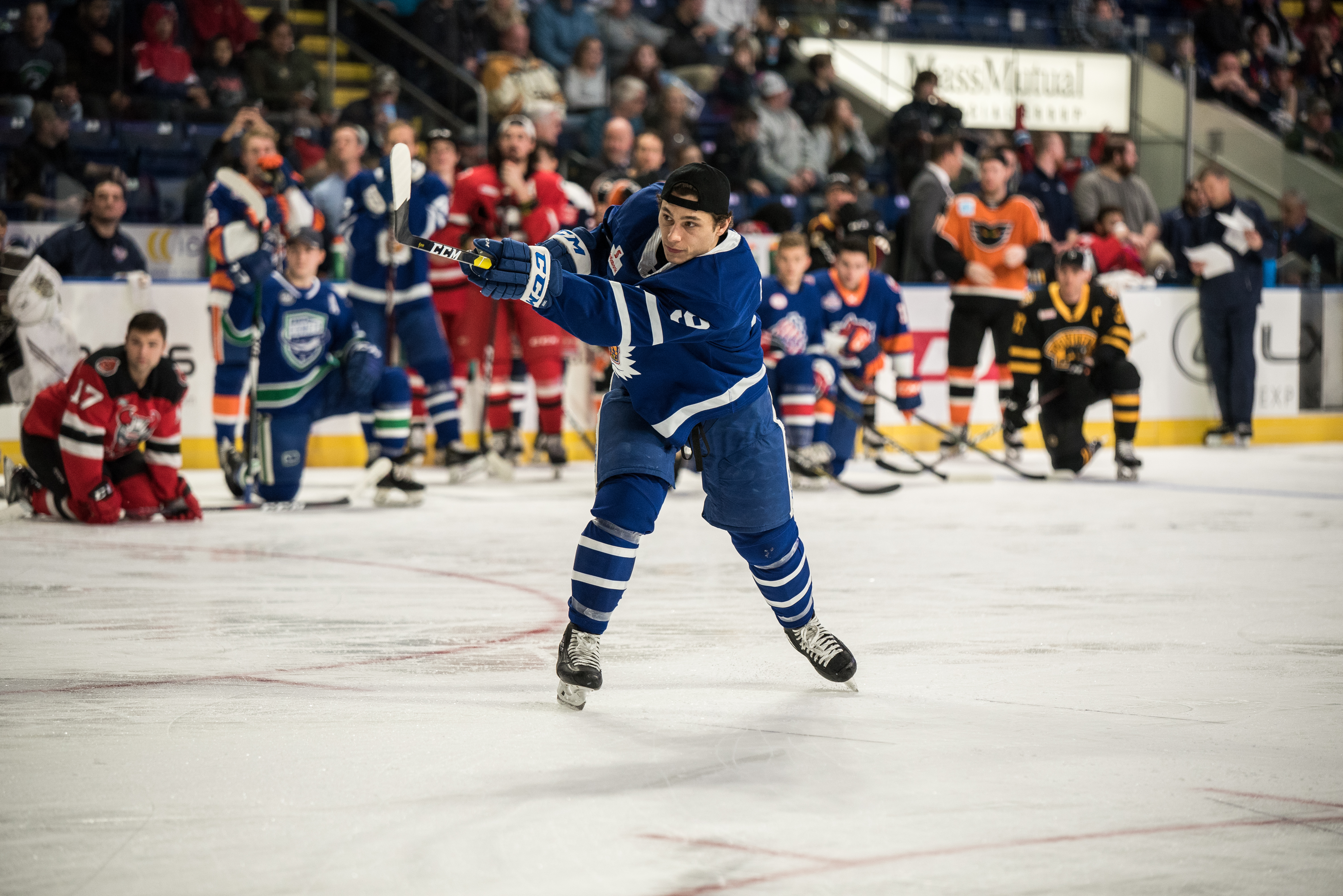 CYW_1844